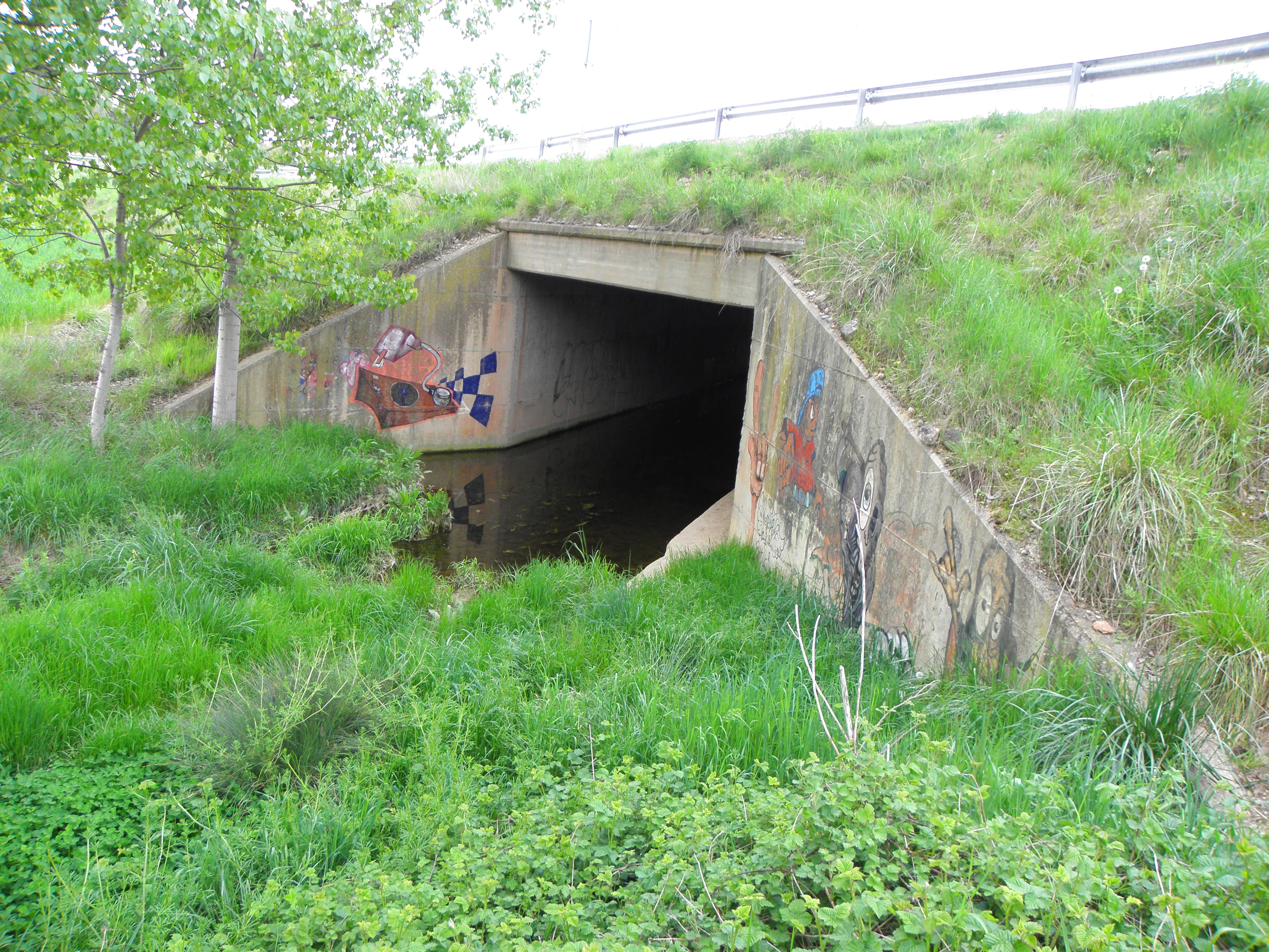 El barranc de Ribalta a la sortida del pont per on travessa la carretera C-451 a Solsona (Solsonès).